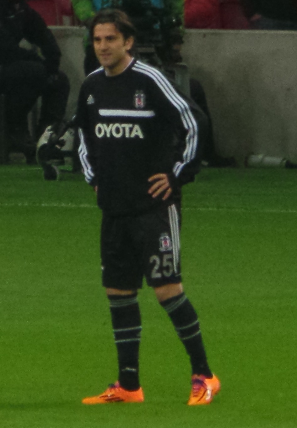 Uğur Boral